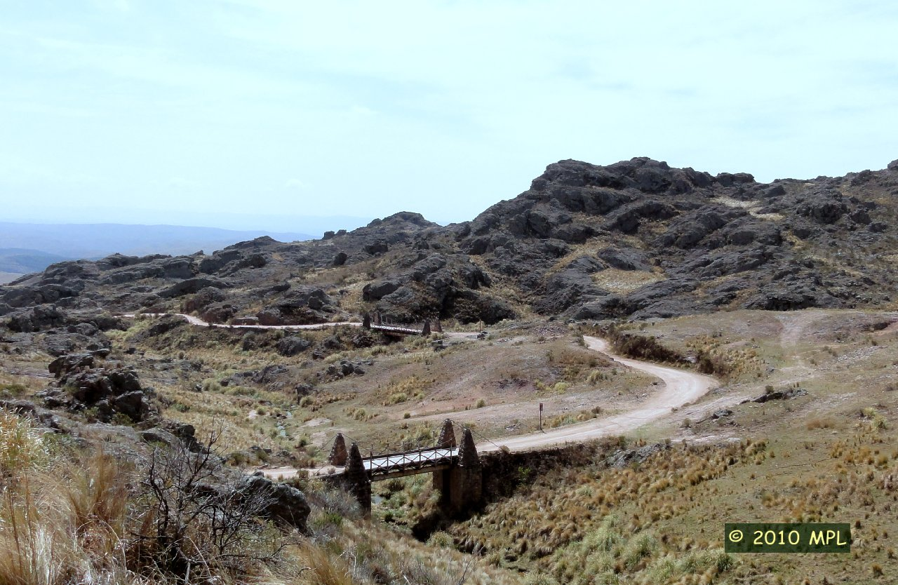 Camino de los puentes colgantes, desde Copina hasta el Cóndor